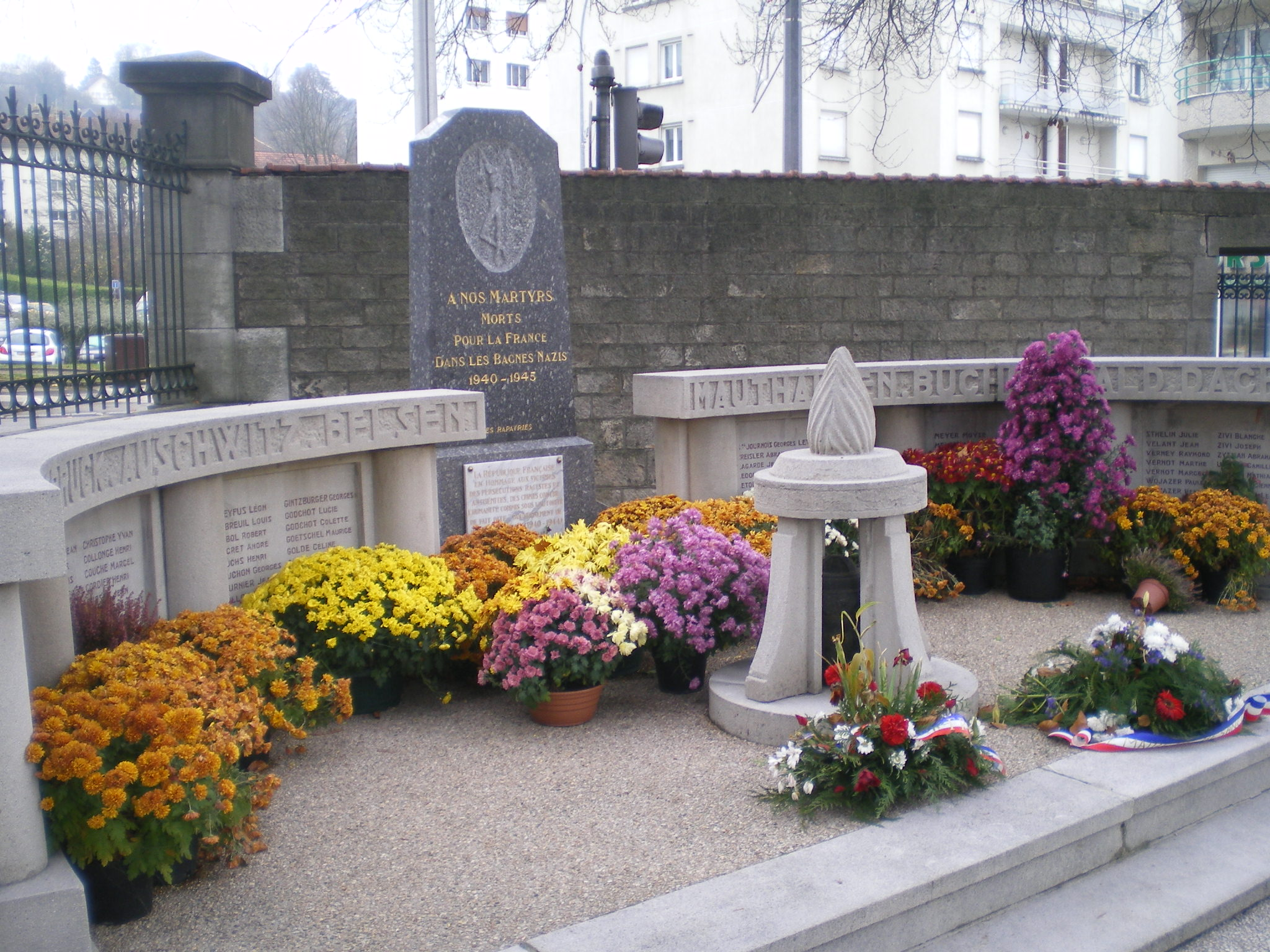 Mémorial